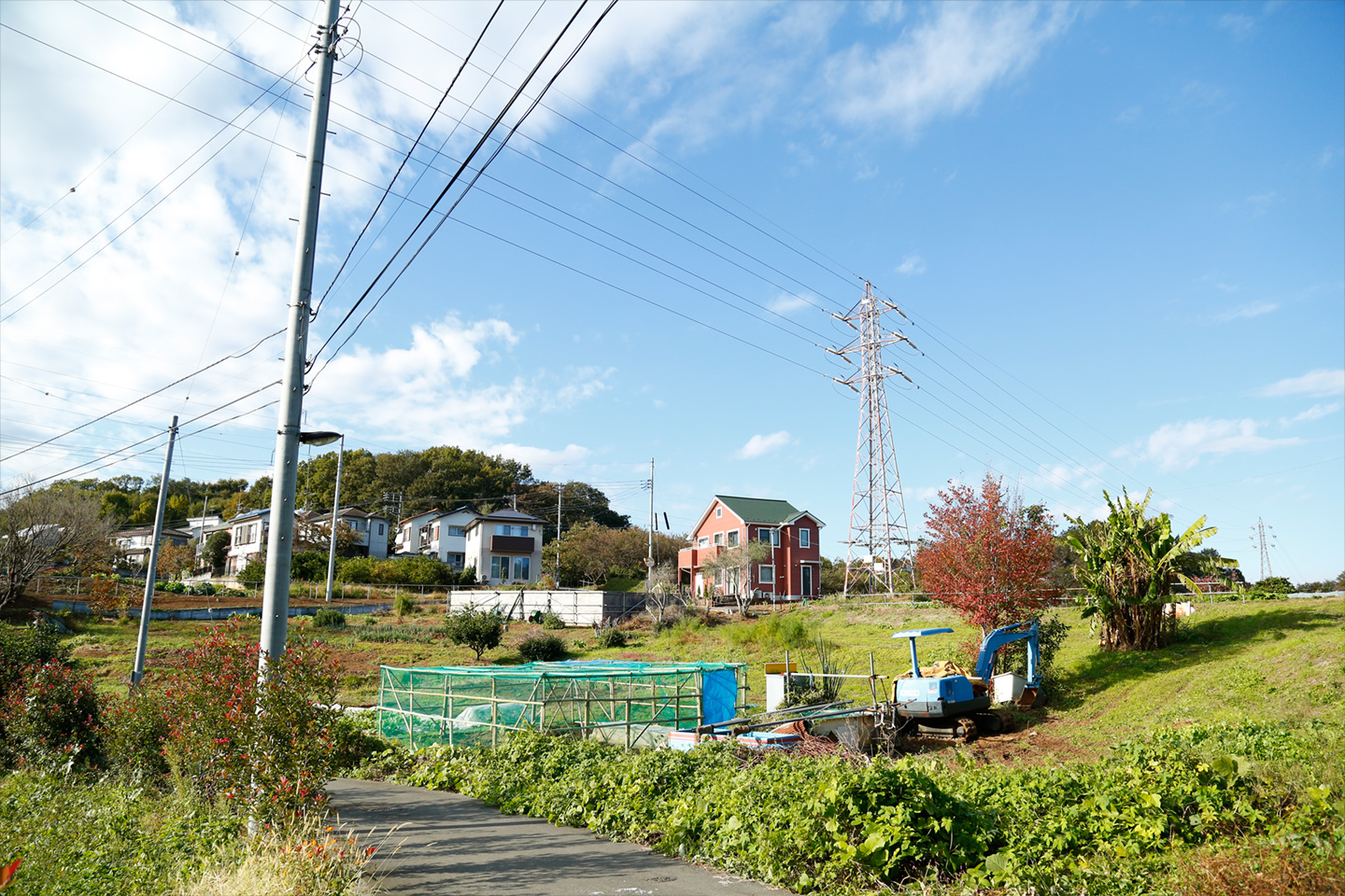 日野市百草の倉沢地域。その1。